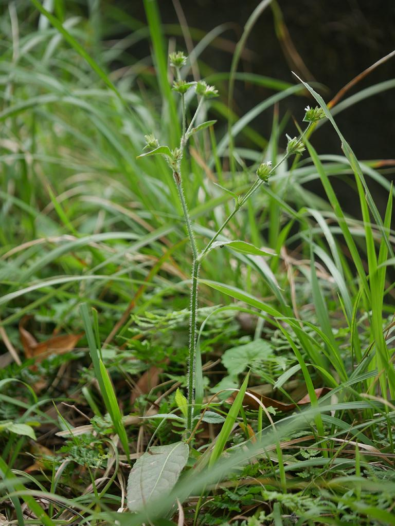 2019/01/01 沖縄本島：Okinawa Island, Japan